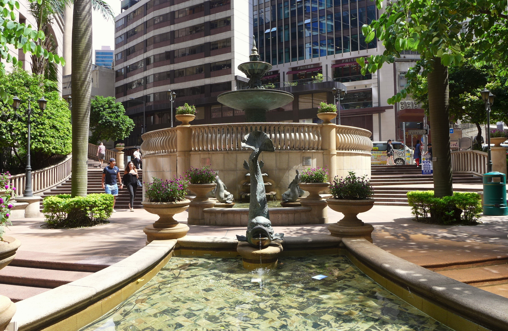 Grand Millennium Plaza Fountain